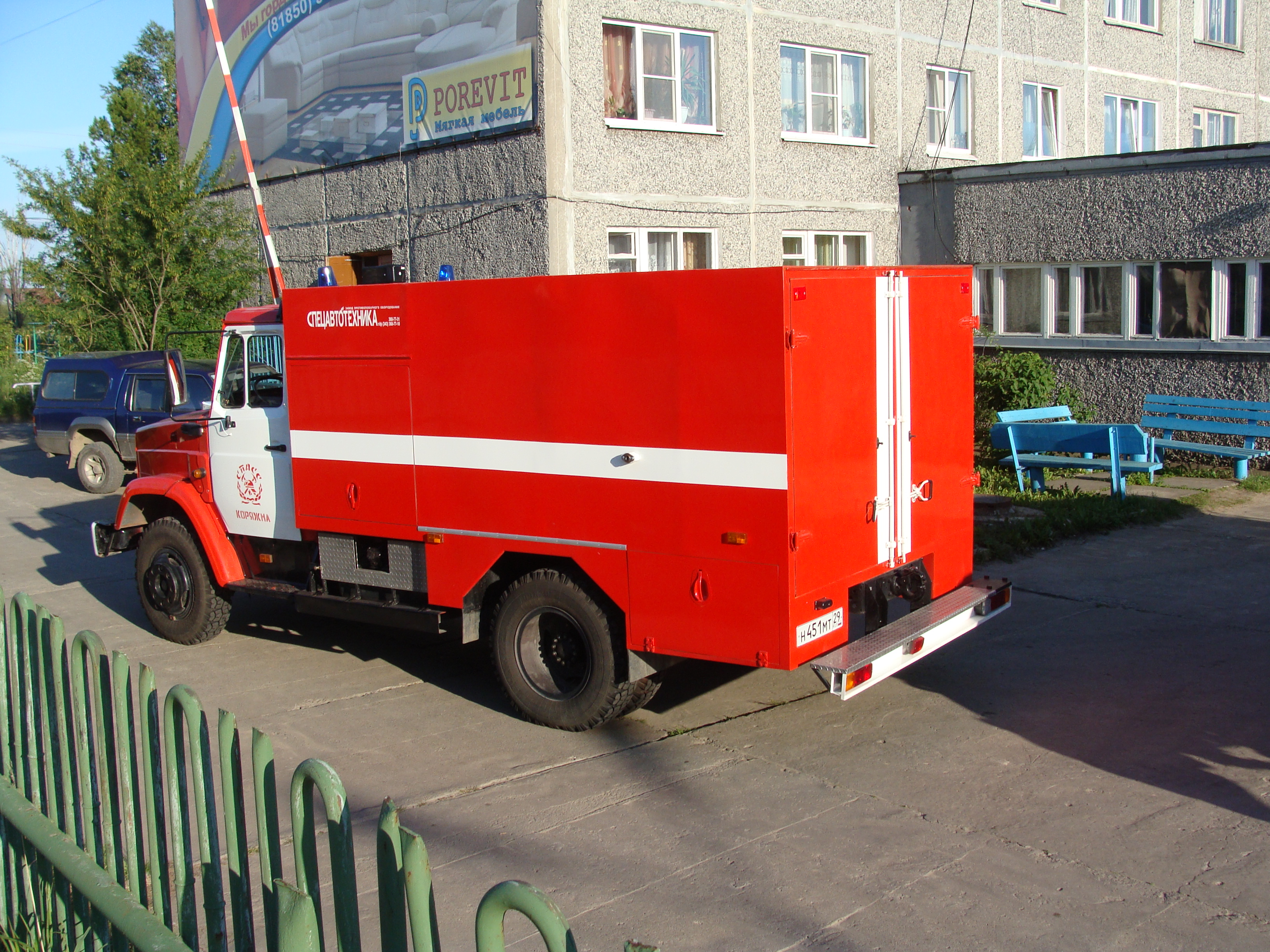 Пожарный автомобиль рукавный АР-0,8/1,2-3(433362) 032 ПВ. СПАСС, Коряжма